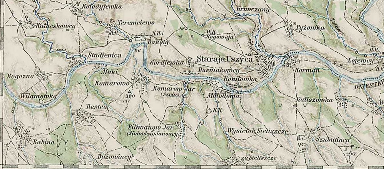 Mołodowa na mapie wojskowej Austro-Węgier. Mapa geograficzna Europy Środkowej 1 200 000. 1910 r.